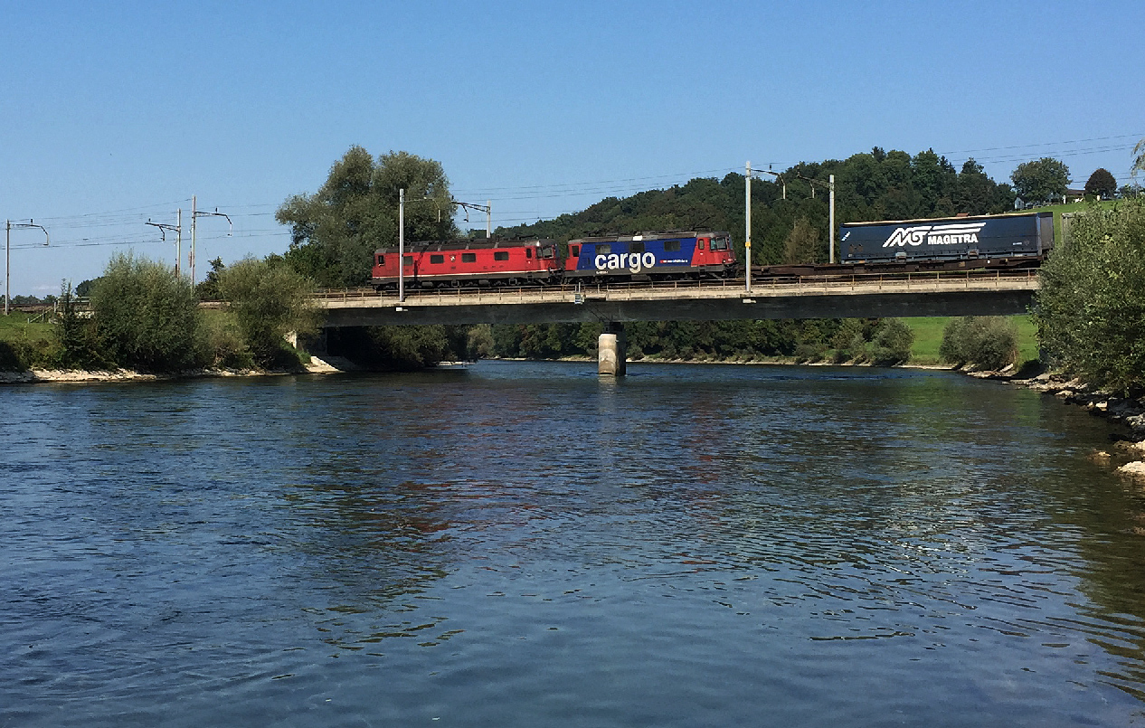 Eisenbahnbrücke